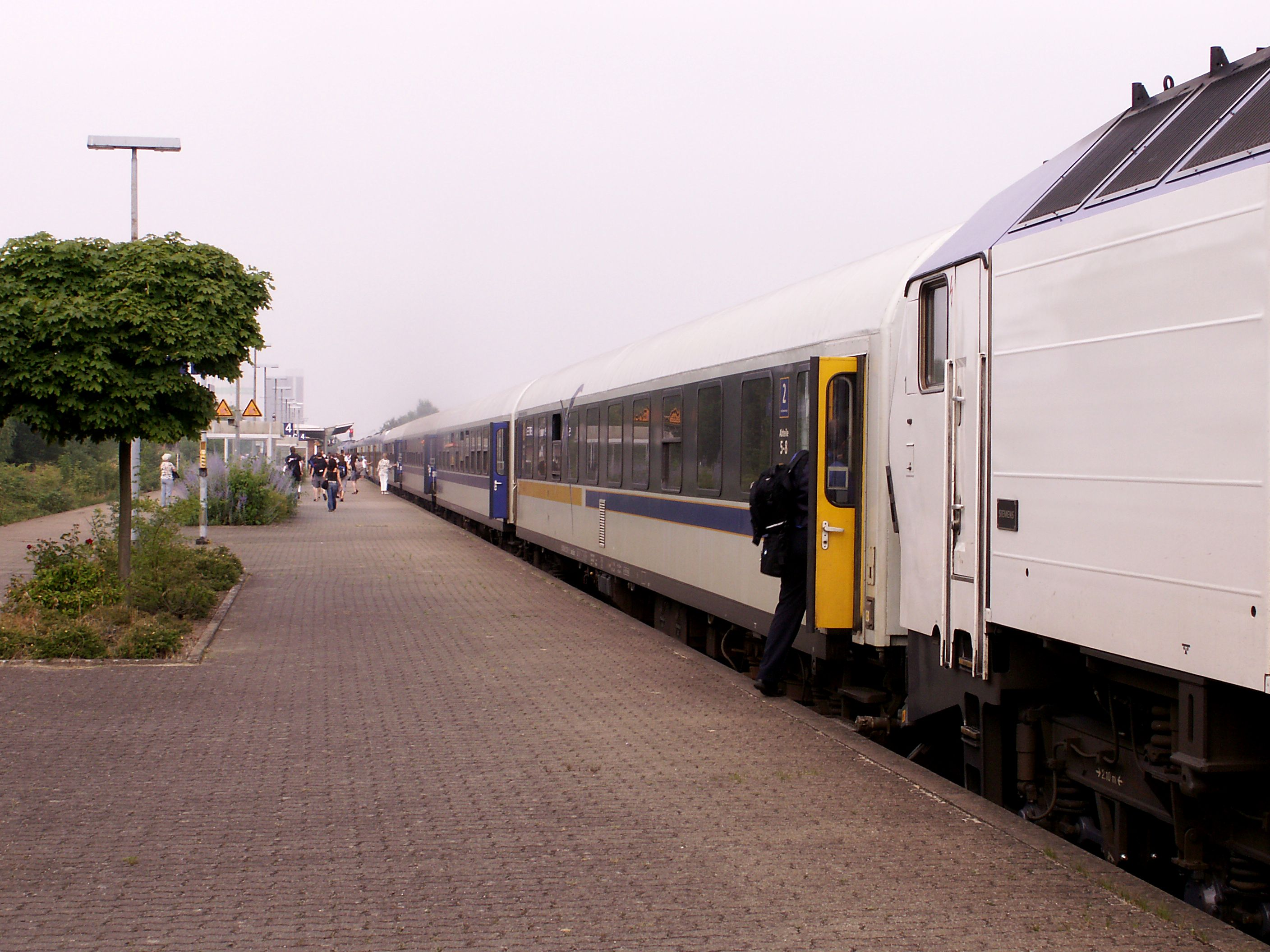 NOB mit FLEX-Waggons in Husum